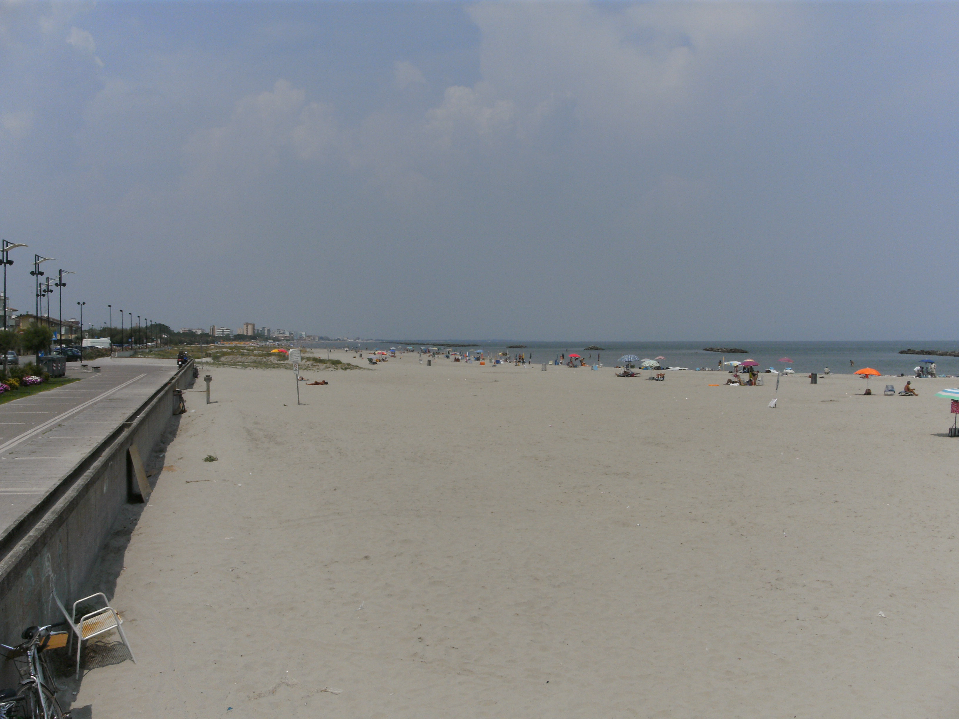 Porto Garibaldi, freier Strand am Nordausgang des Orts